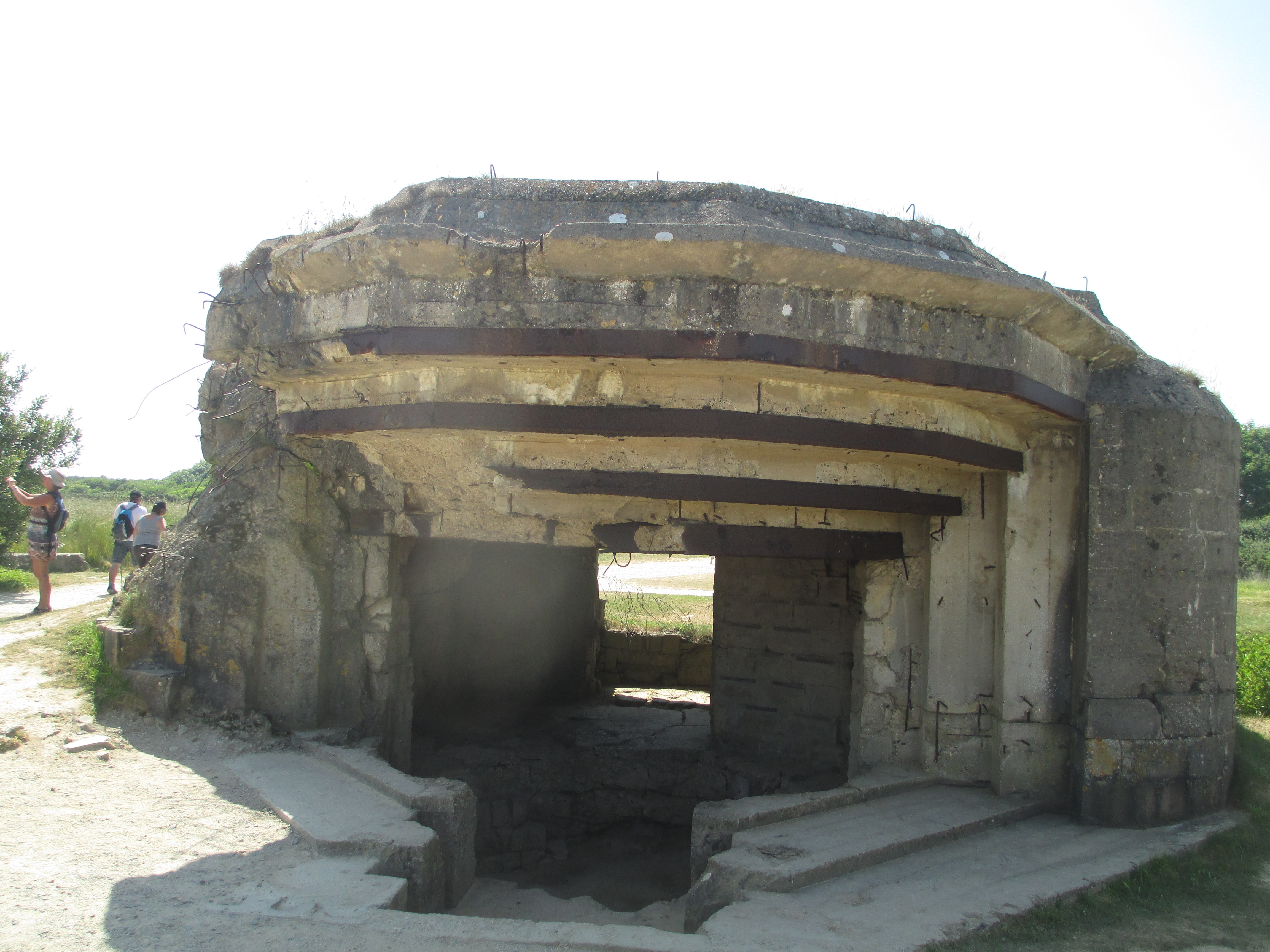 פוינט דו הוק